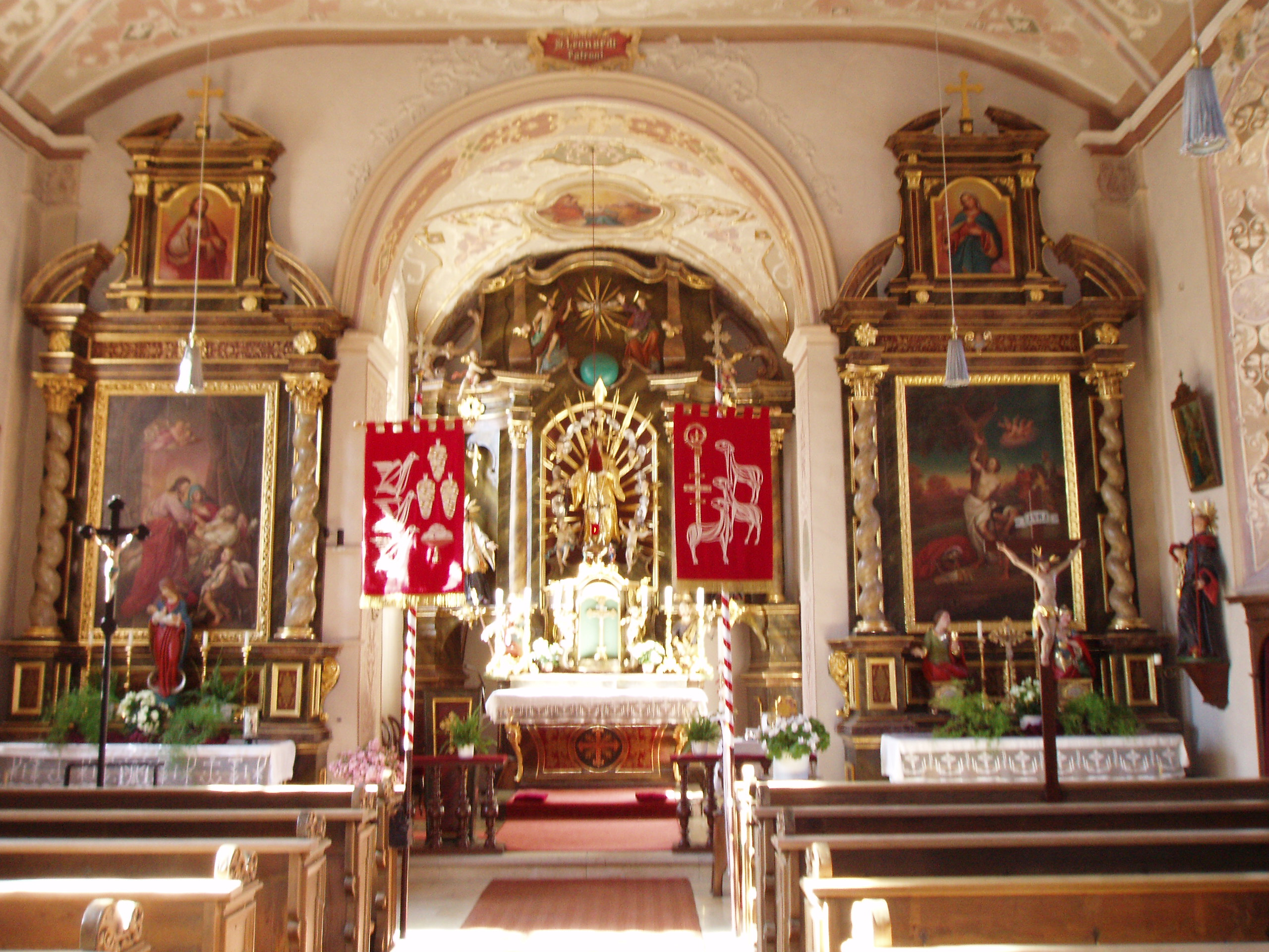 Gammersfeld im Landkreis Eichstätt, barockes Kircheninneres